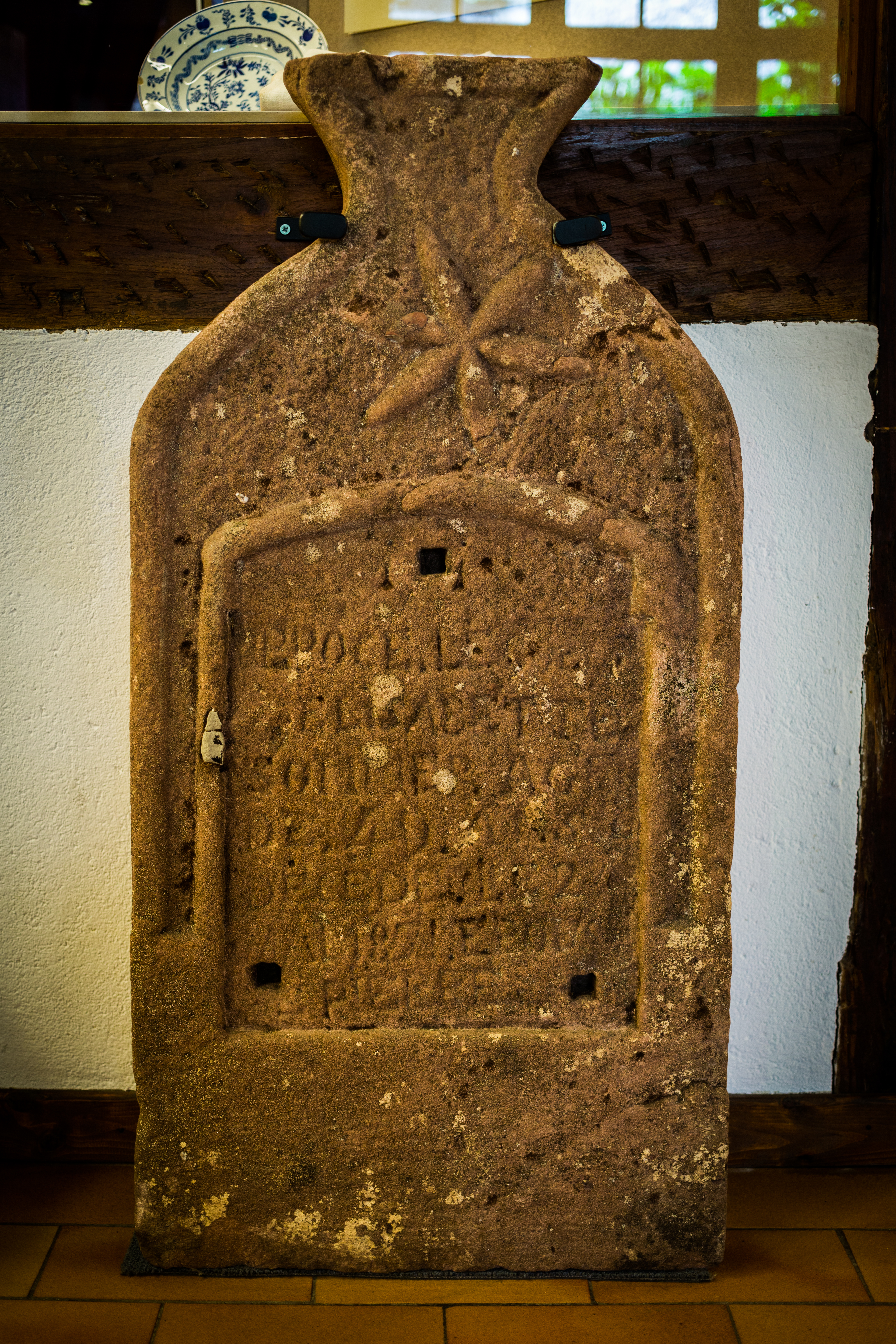 Musée alsacien de Strasbourg : stèle funéraire d’Elisabeth Sommer. Grès rose sculpté, 1871, Don de M. J. Bacher, Les Quelles. Cimetière des Quelles, commune de La Broque (Bas-Rhin). Avec l'inscription : ICI REPOCE LE CŒUR D ELISABETTE SOMMER AGE DE 49 ANS DECEDE LE 24 MAI 1871 EPOUSE PIERRE (Son mari était Pierre Bacher de Bourg-Bruche) Les pierres tombales mennonites de la vallée de la Bruche avaient une forme particulière : la partie supérieure était pourvue d’un resserrement ou « cou », qui s’évasait ensuite vers le haut, qui se trouvait orné d’un cœur élargi ou d’une rosace-étoile.